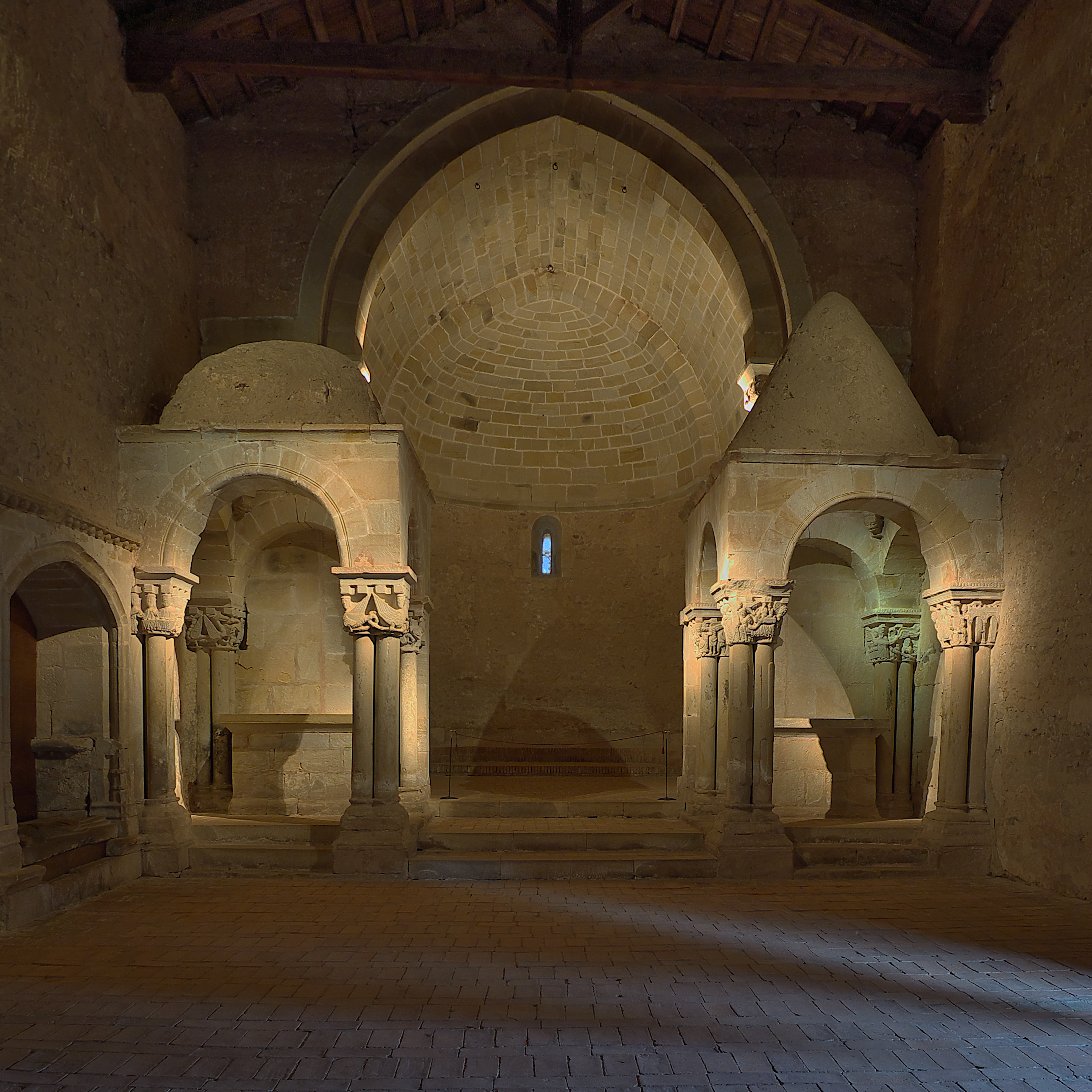 Ábside de la iglesia. La iglesia es de nave única y cubierta de madera, de principios del XII, presenta una capilla mayor abovedada y anteábside con bóveda de cañón apuntado, empleando sillería. En etapa constructiva posterior del monasterio se construyen los baldaquinos desiguales, ocasionando la pérdida de visión de los capiteles del arco del ábside, con motivos vegetales.